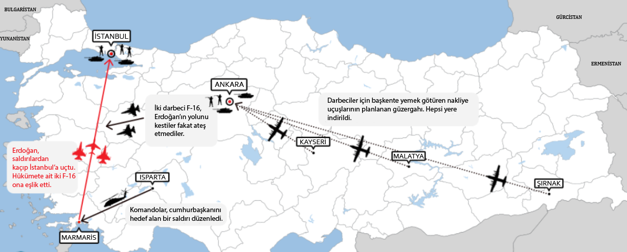 Darbe girişimi